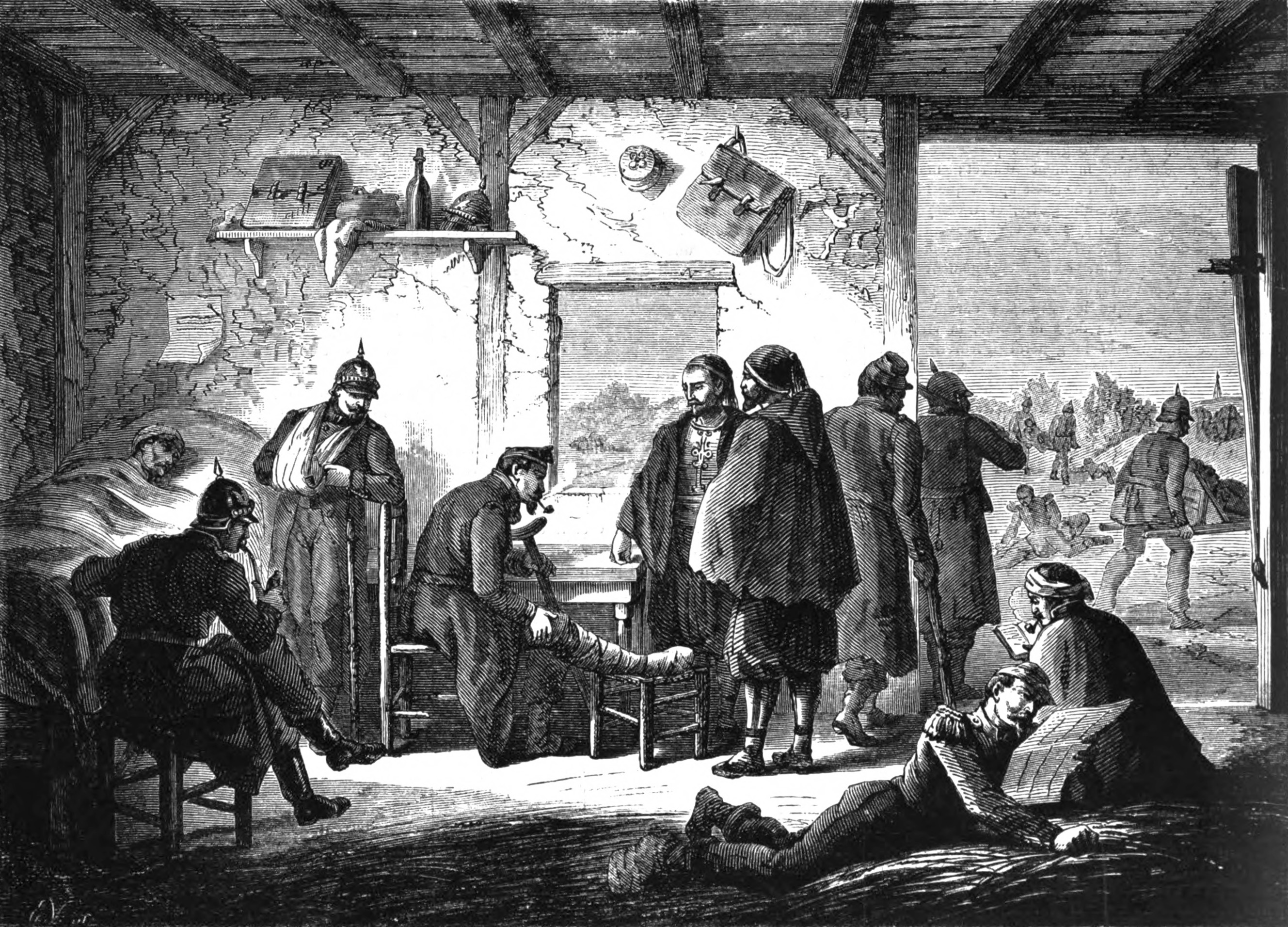 une ambulance le lendemain de la bataille de Spicheren